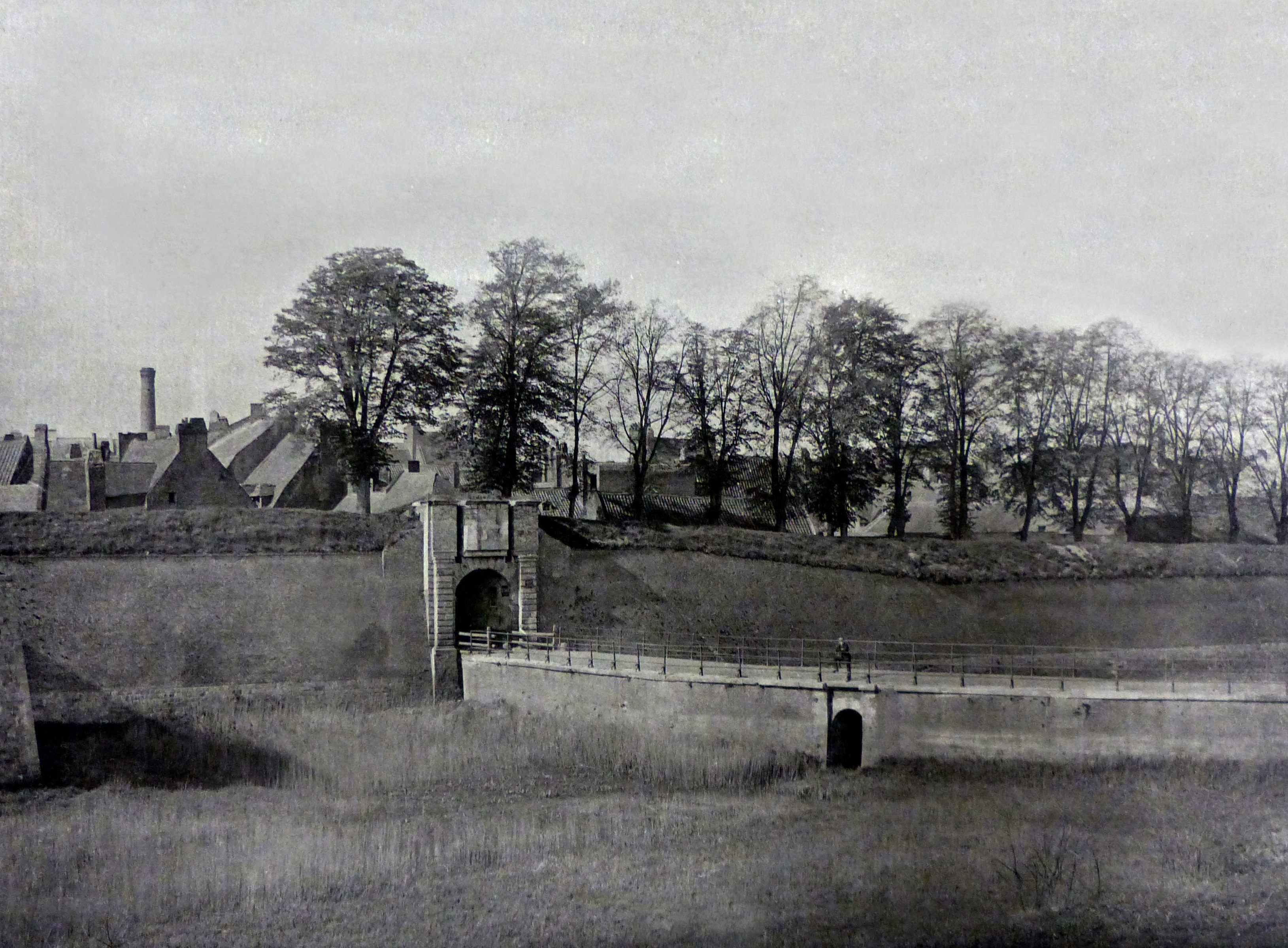 Photographie d'un cliché de Houpe. Vue prise en 1893.